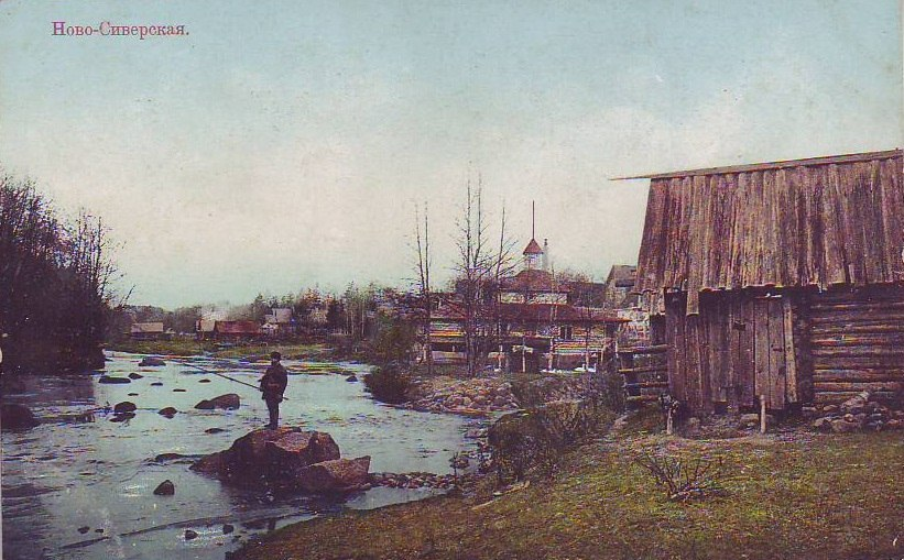 Ново-Сиверская. Открытка начала XX века.